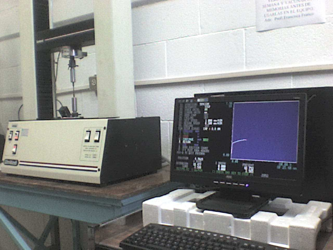 Máquina de ensayo de tensión por computadora, del laboratorio de Introducción a los Materiales, Universidad Autónoma Metropolitana, UAM Azcapotzalco.